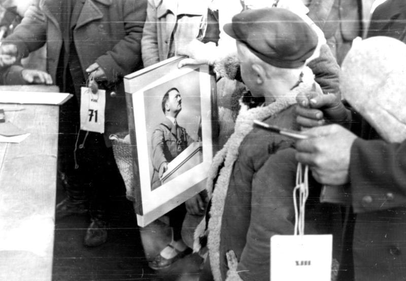 Polen, Betreuung von Umsiedlern Distr. Lublin/ Cholmer Land Cholmer Umsiedlung: NSV händigt den Umsiedlern im Lager Pinne Führerbilder für ihre Wohnungen aus 1940/41 [Polen, Umsiedlerlager Pinne.- Deutschstämmige Umsiedler erhalten gerahmte Porträtfotos von Adolf Hitler.]